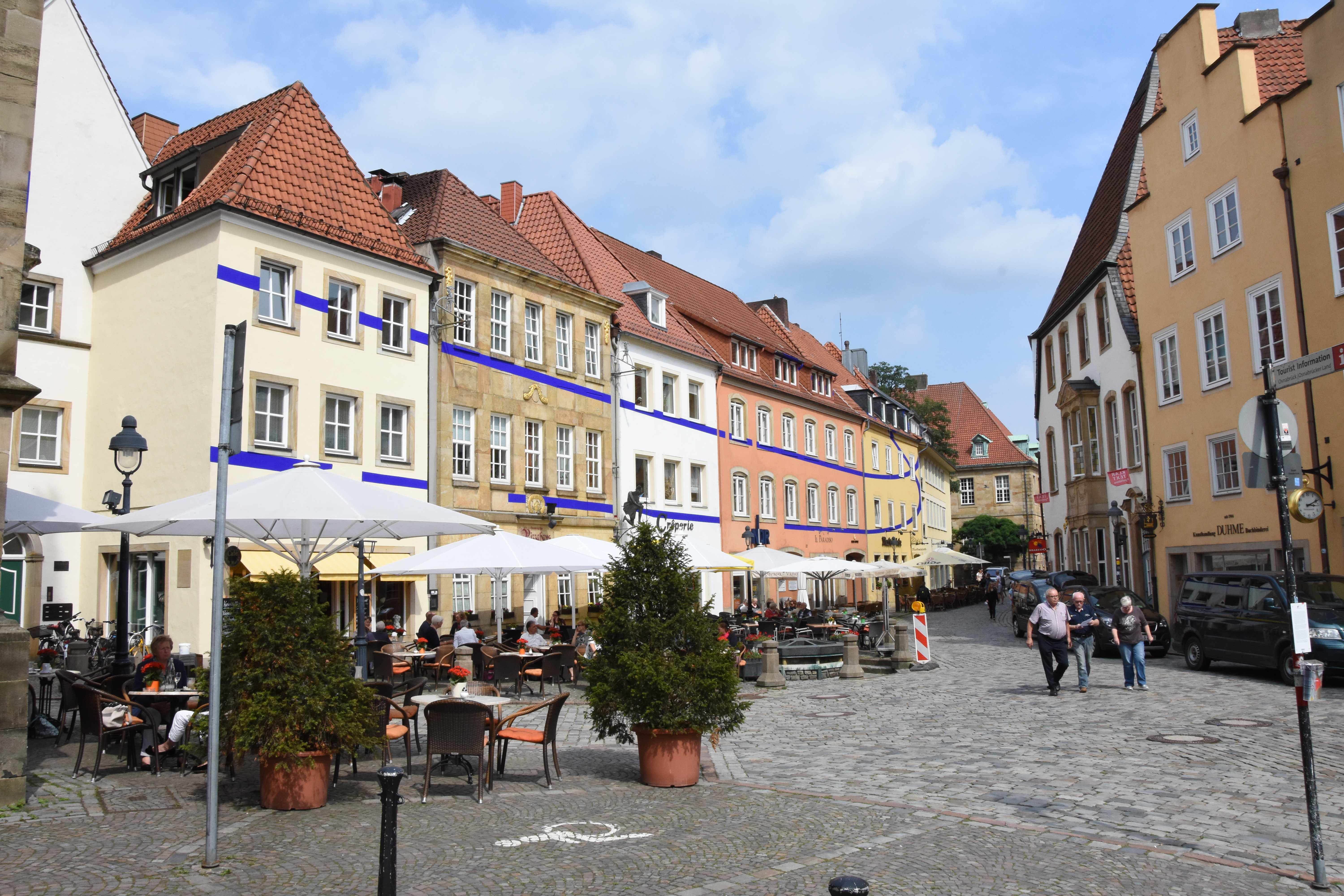 Am Marktplatz Osnabrück 2017